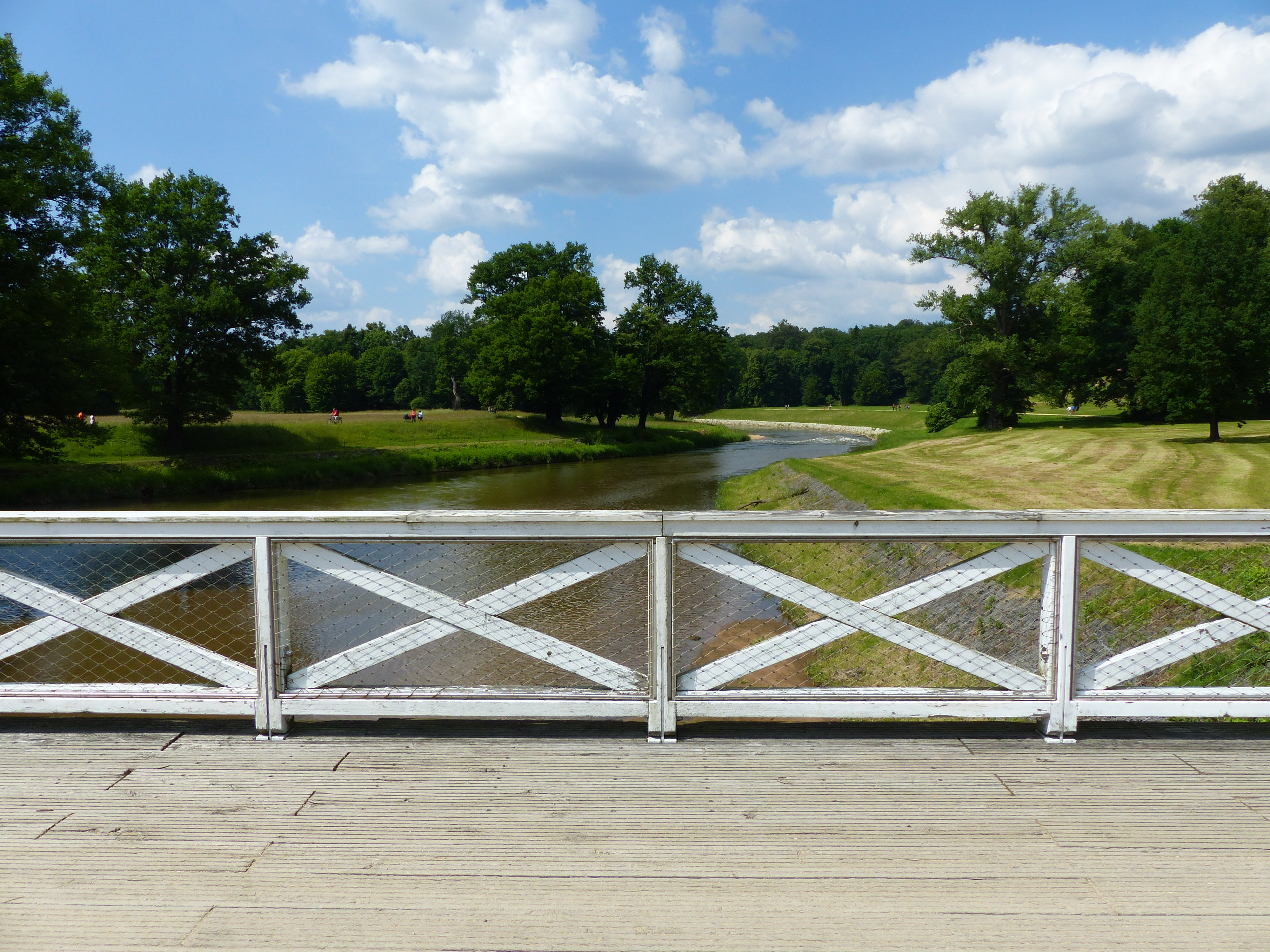 Fürst-Pückler-Park Bad Muskau, Muskauer Parklandschaft (LSG d 48), UNESCO-Welterbe